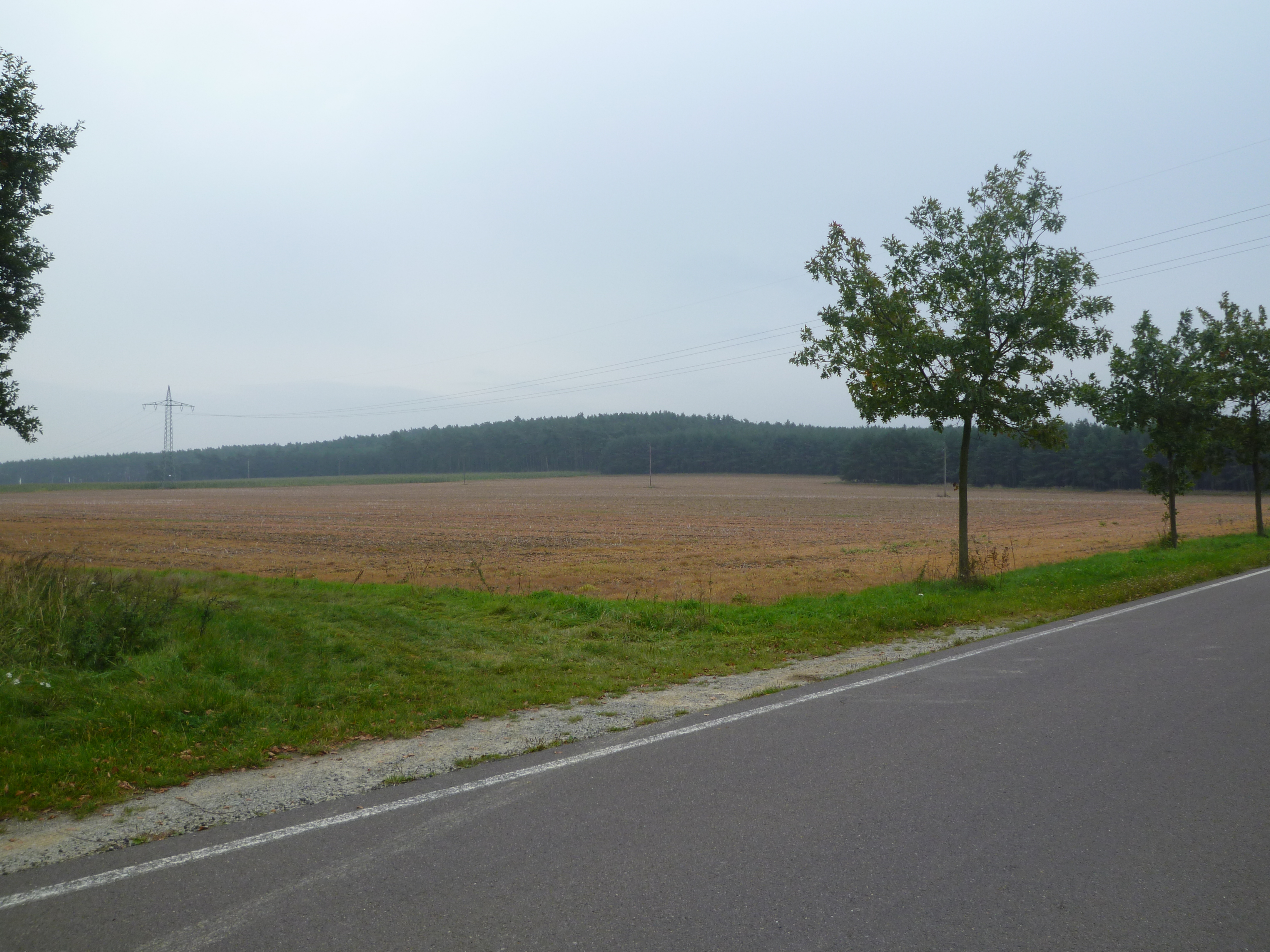 Bild zeigt Langen Berg an der Straße zwischen Velsdorf und Calvörde-Wegenstedt